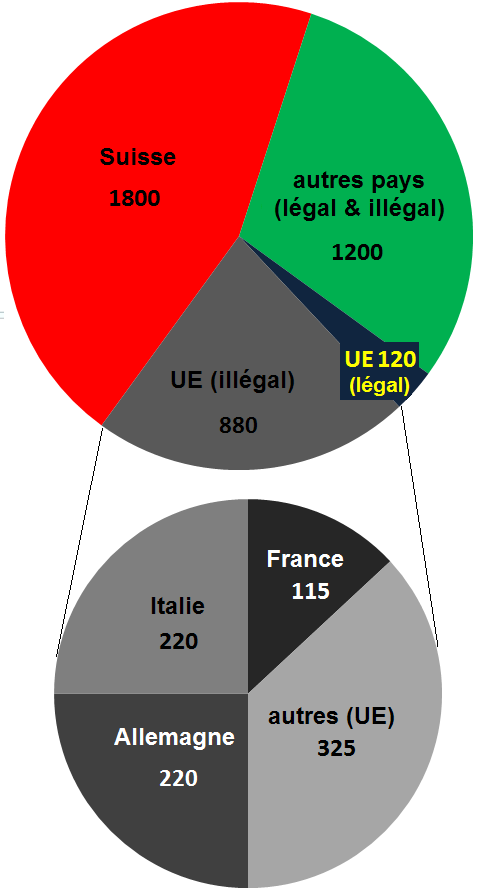 Suisse marche financier